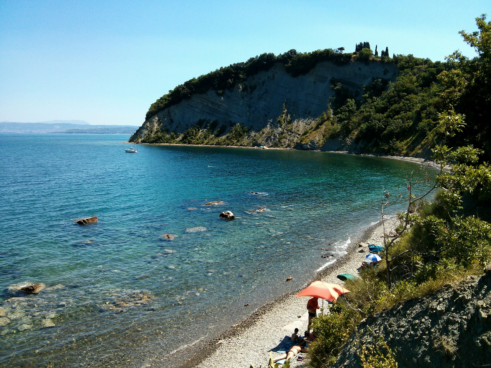 Mesecev zaliv